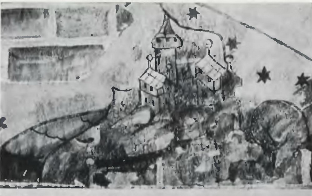 Widok Zamku Piastowskiego na polichromii w kościele Trójcy Świętej. Polichromia ta została odkryta w 1926 roku podczas przebudowy kościoła. Prawdopodobnie znajdowała się w jednej z cel franciszkańskich, której okno wychodziło na zamek.